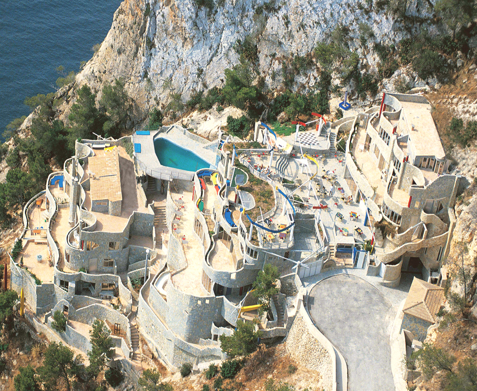 El primer edificio que tiene la forma de un cerebro a vista de pájaro. Con la forma del museo, el artista quiere mostrar su mayor obra escultórica, y comunicar a la humanidad que sus cerebros son tan creativos como el de Leonardo da Vinci y que deben mirar el funcionamiento de su cerebro desde una vista de pájaro, observarse desde fuera de su cuerpo, para descubrirse nuevas habilidades.